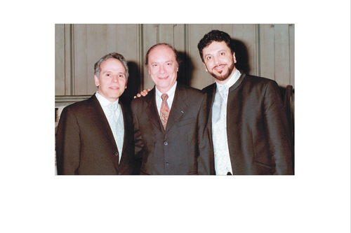 Maximiliano de Brito, Jorge Antunes, Renato Mismetti